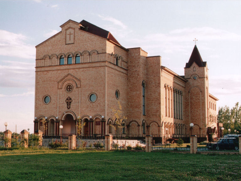 Здание Христианской Евангельской Церкви Великого Новгорода по адресу ул. Кочетова 24.